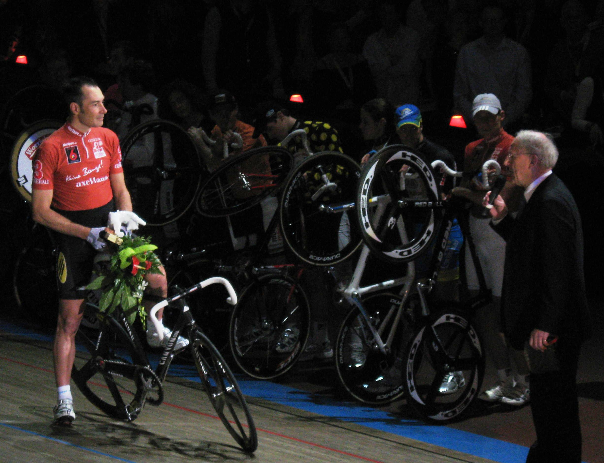 Erik Zabel bei seiner Verabschiedung, Sechstage-Rennen Berlin 2009